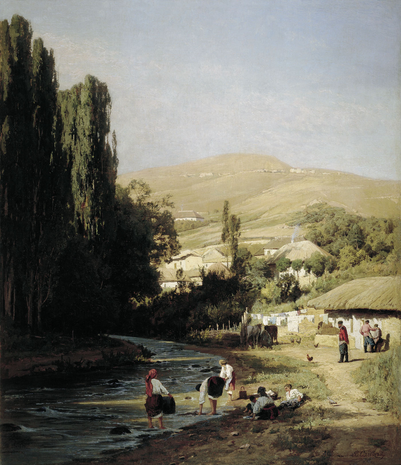 Кисловодск (картина:холст,масло,127/109см)